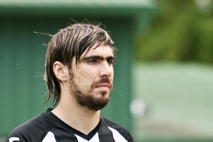 Артем Бутенін - український футболіст, захисник.